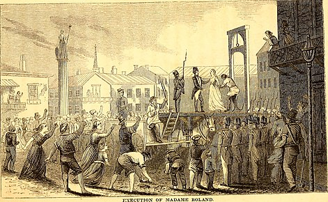 מאדאם רולנד מוצאת להורג